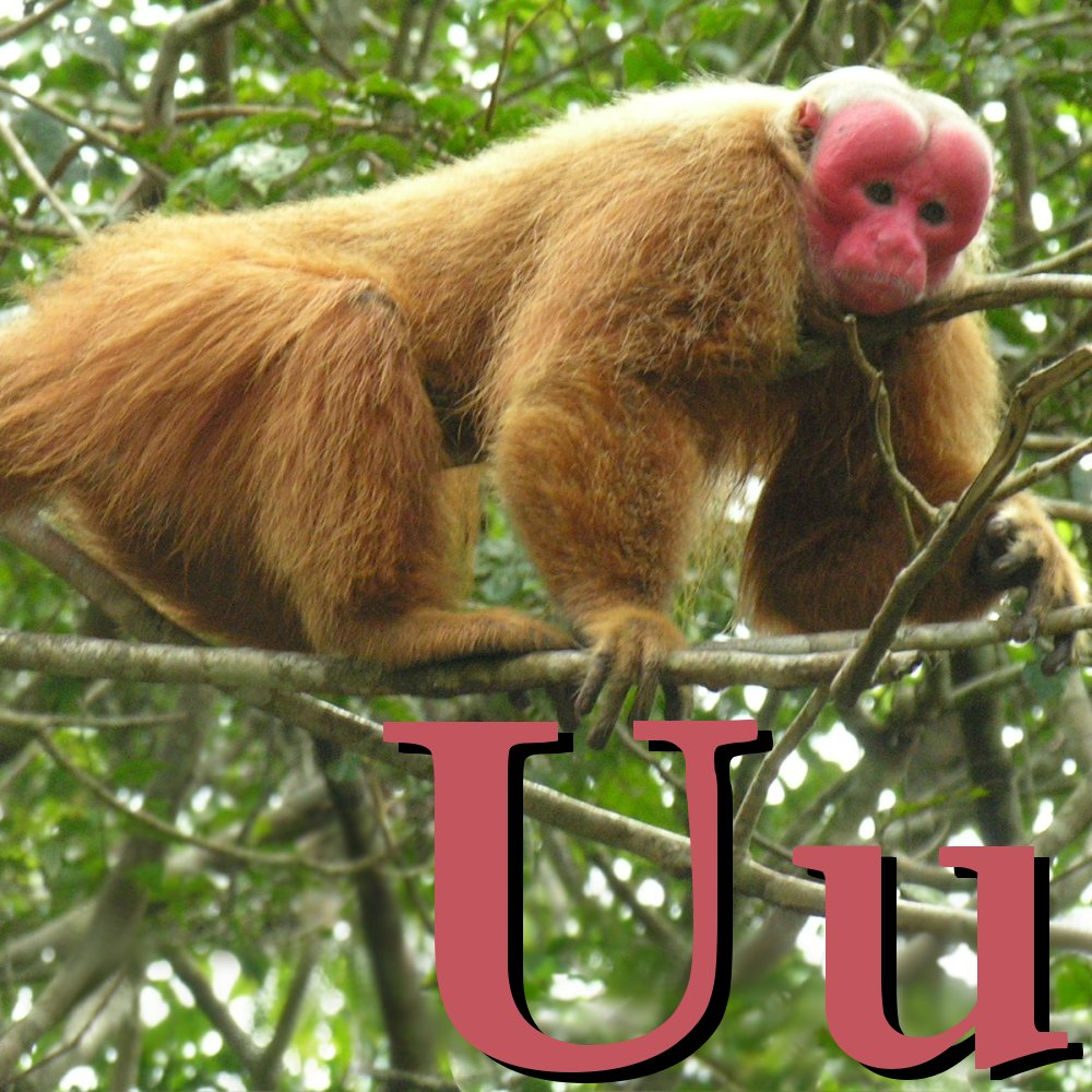 Animal Alphabet Letter Uakari (Cacajao calvus)